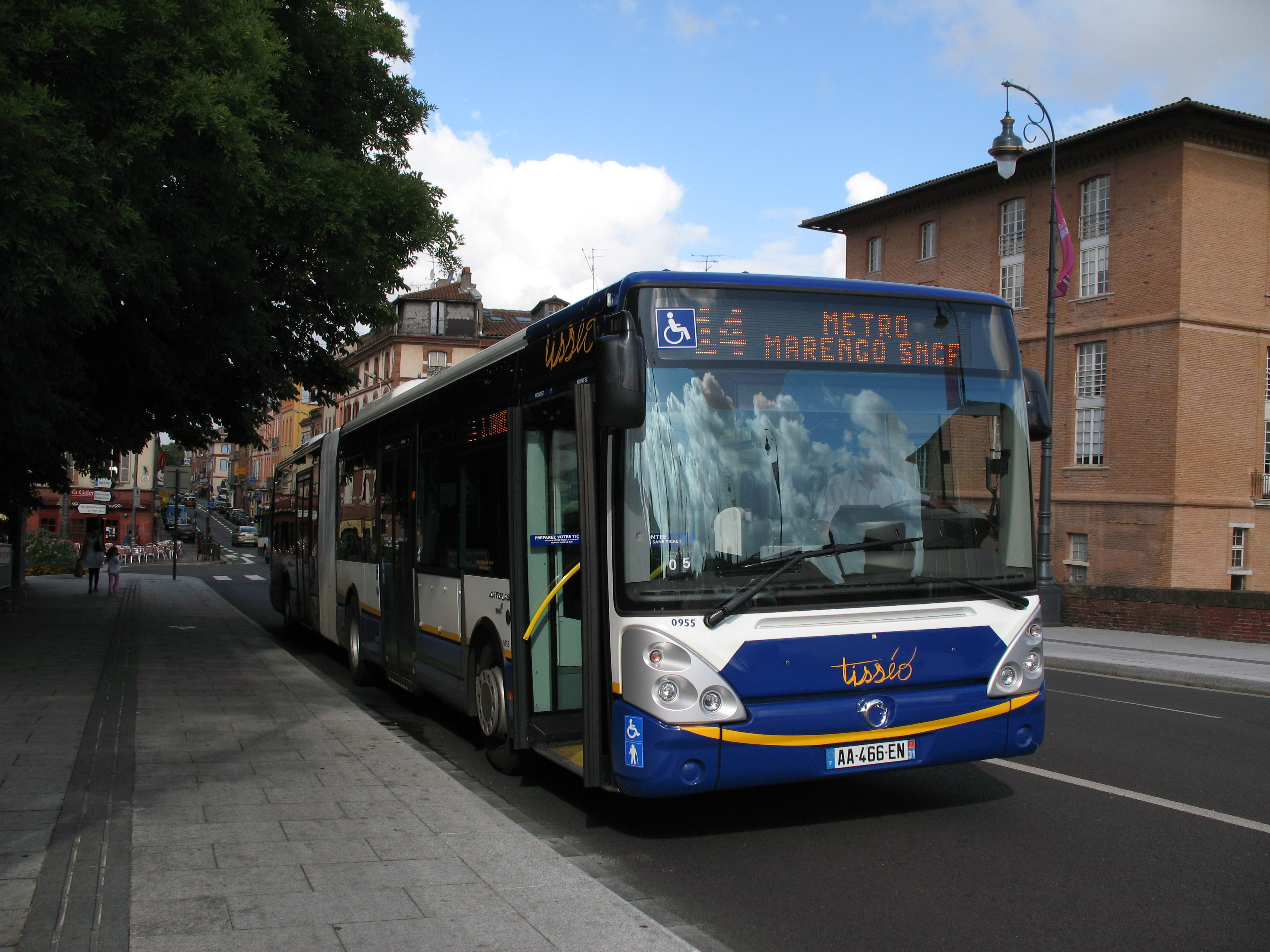 Irisbus Citélis 18 de Tisséo sur le Pont-Neuf à Toulouse (Haute-Garonne, France).